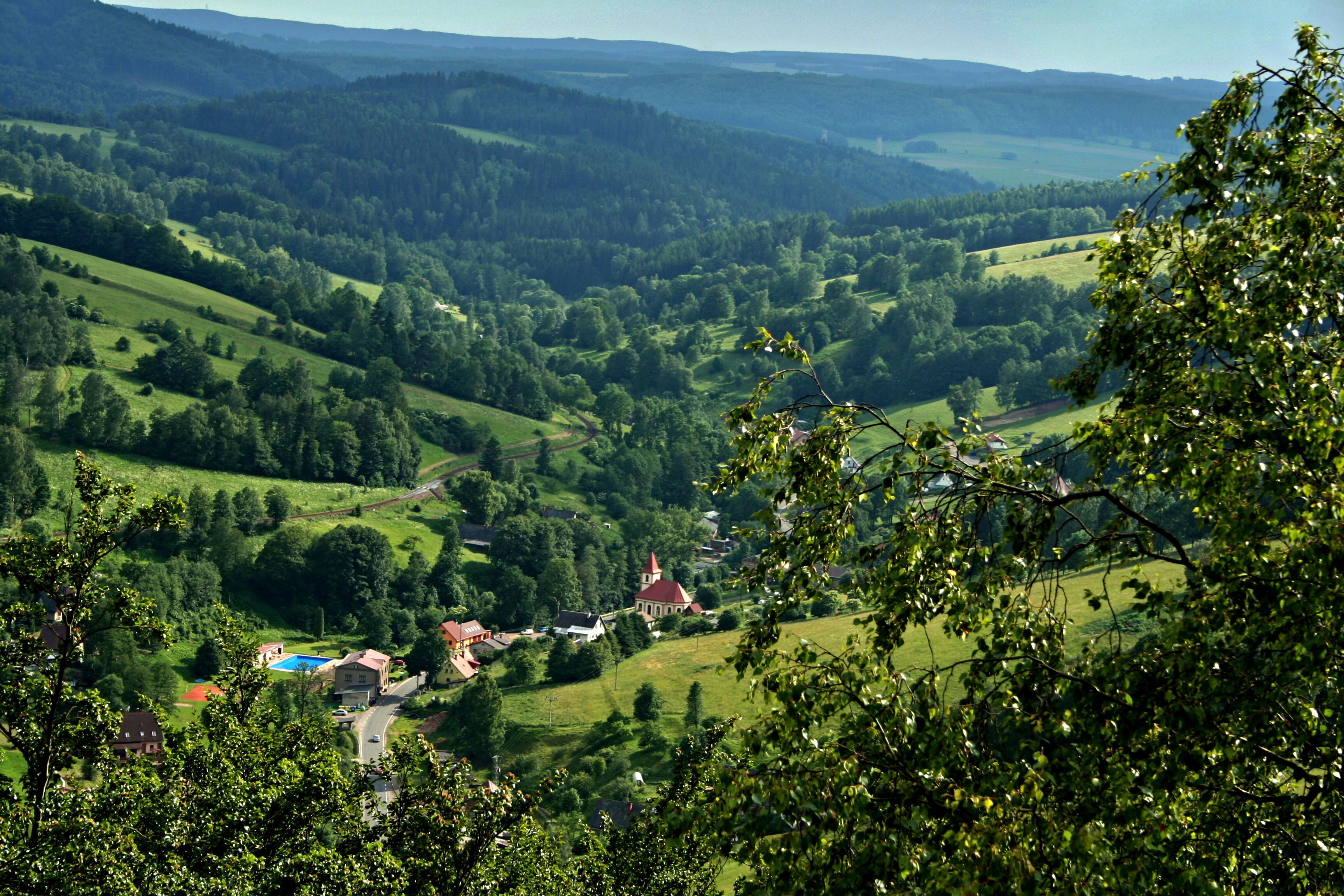 Pohled od studánky pod Janským vrchem